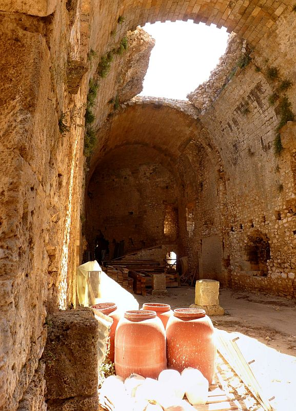 Chlemoutsi (Greek: Χλεμούτσι or Χλουμούτσι) is a medieval castle in the northwest of the Elis regional unit, Greece. It was built by the Crusader rulers of the Principality of Achaea as their main stronghold, and is perhaps the finest fortification of the early Frangokratia period preserved in Greece. But a link to - I would be happy :)